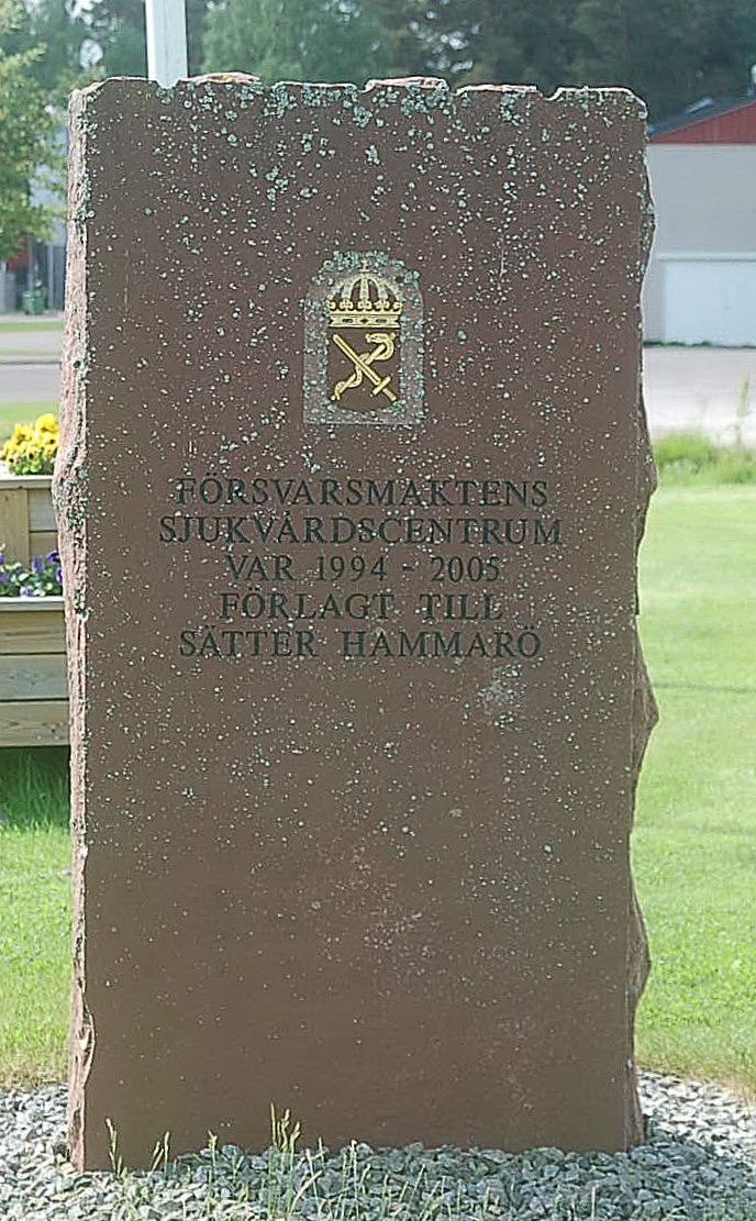 Minnessten över Försvarsmaktens sjukvårdscentrum som var 1994-2005 förlagt till Sätter, Hammarö.